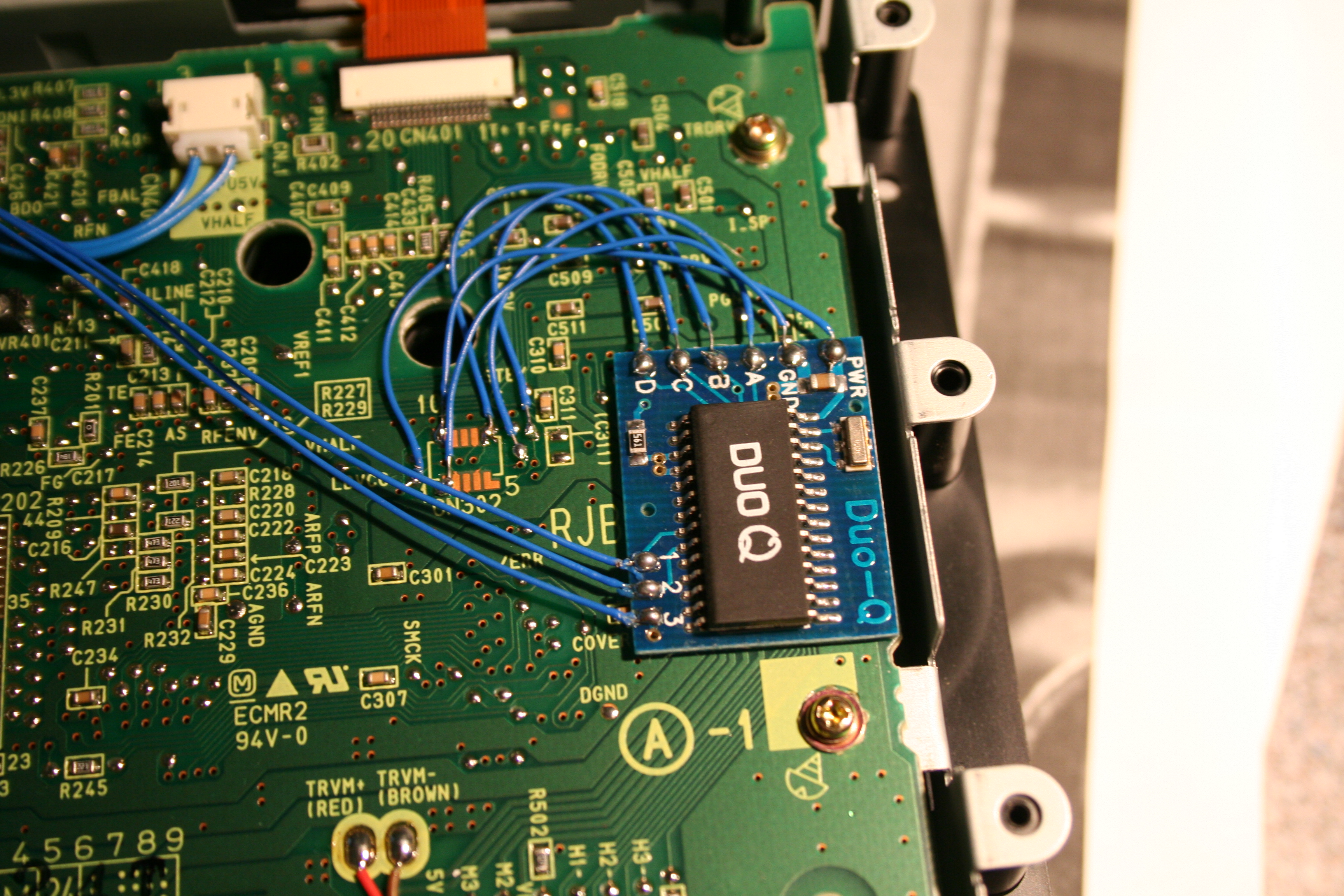 DuoQ Modchip auf Gamecube-Platine